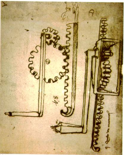 Schéma d'un cric par Léonard de Vinci.